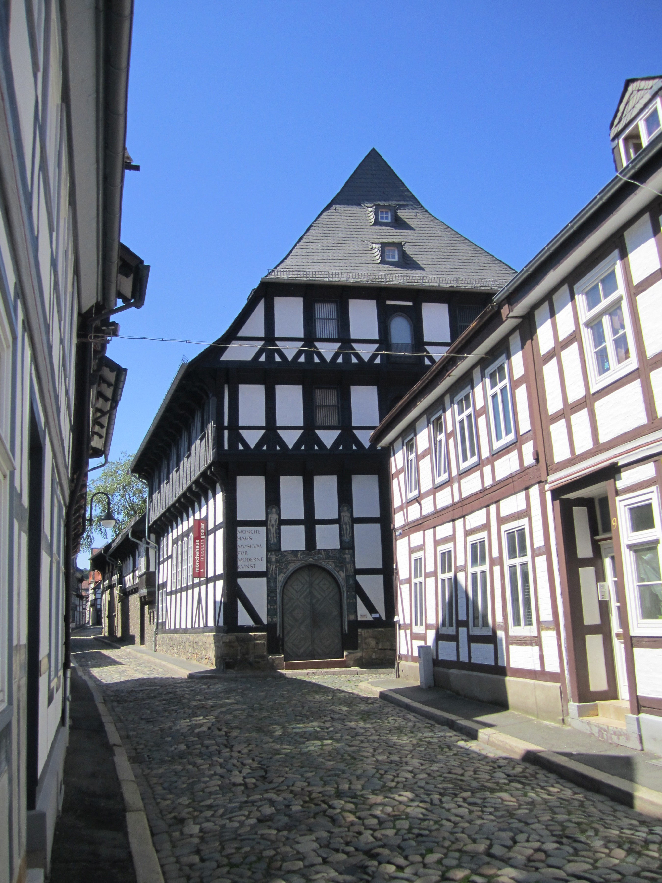 Jakobistraße, Goslar, Deutschland.